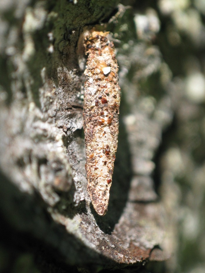 Sack von Taleporia tubulosa